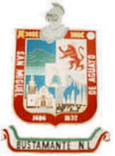 El escudo de Bustamante diseñado en 1984.